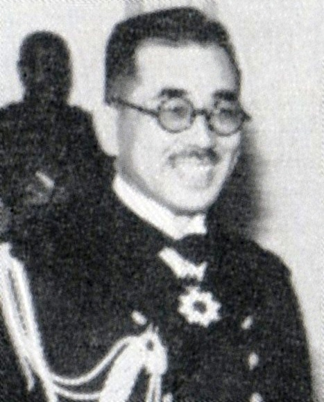 Noda Kiyoshi was an Imperial Japanese Navy Vice Admiral